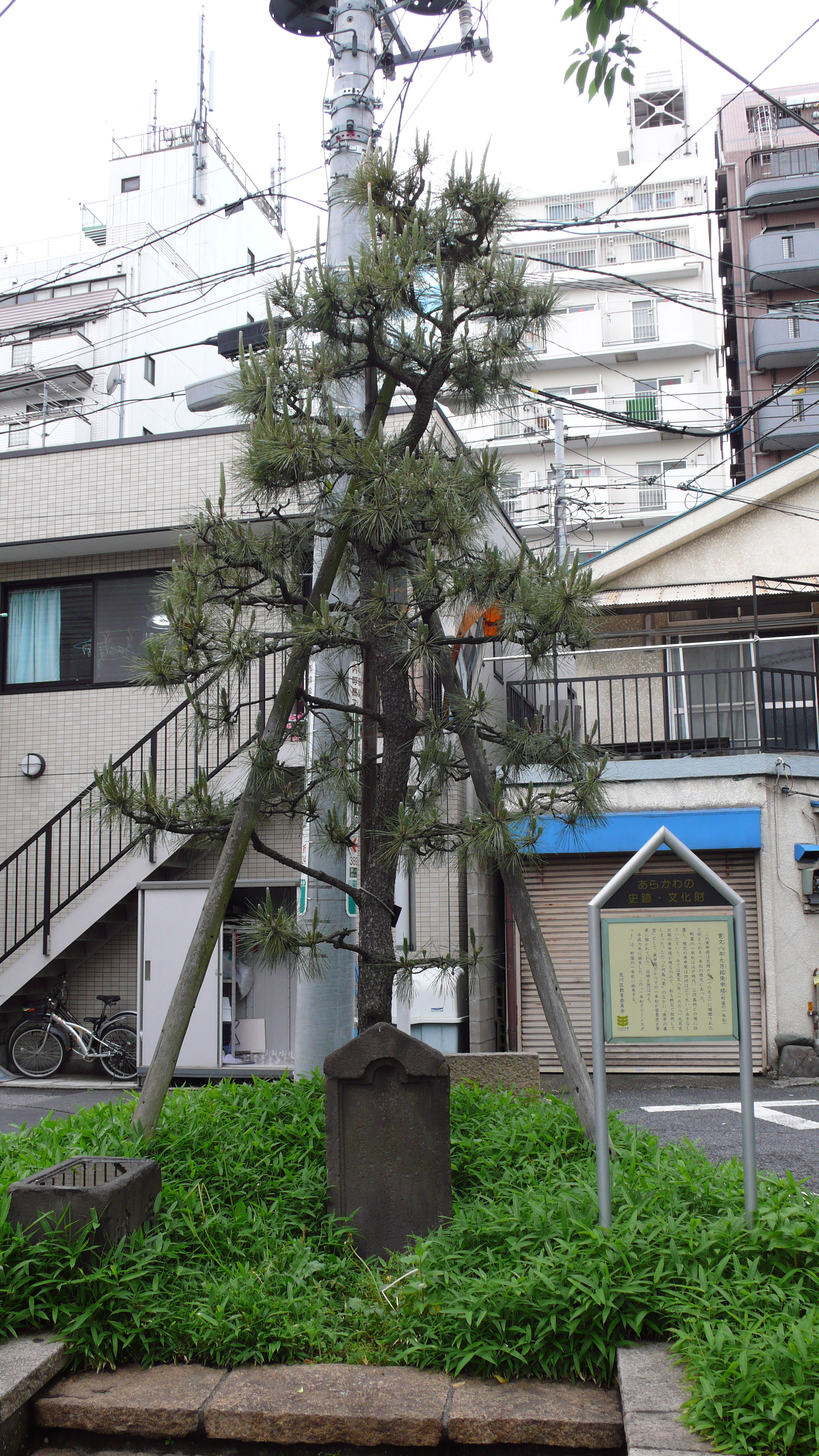 一本松グリーンスポットと庚申塚